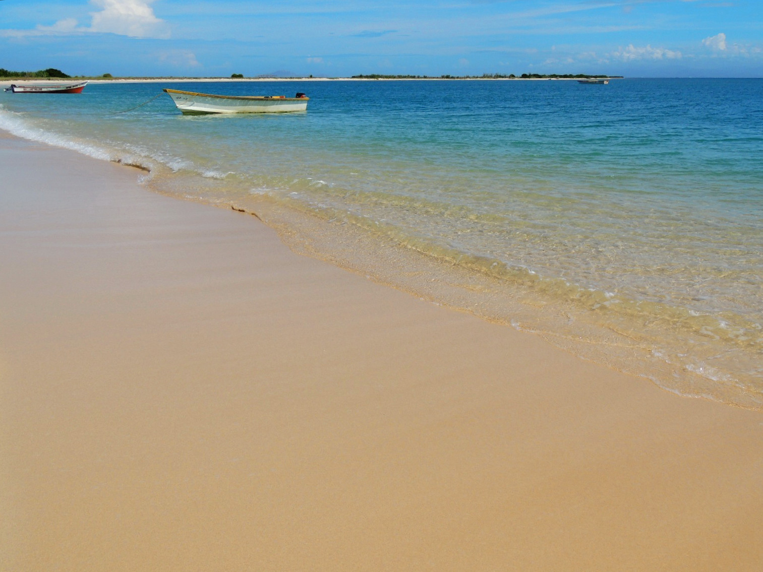 Un escape ideal a la rutina diaria. Se recomienda llevar provisiones de comida.